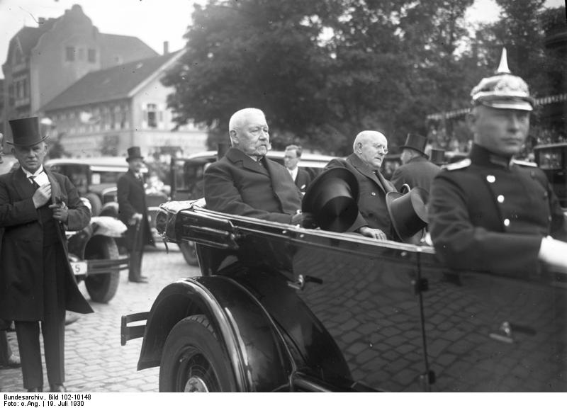 Der jubeldene Empfang des Reichspräsidenten von Hindenburg im befreiten Rheinland! Reichspräsident von Hindenburg und der bayerische Ministerpräsident Dr. Held während der Fahrt durch Speyer.